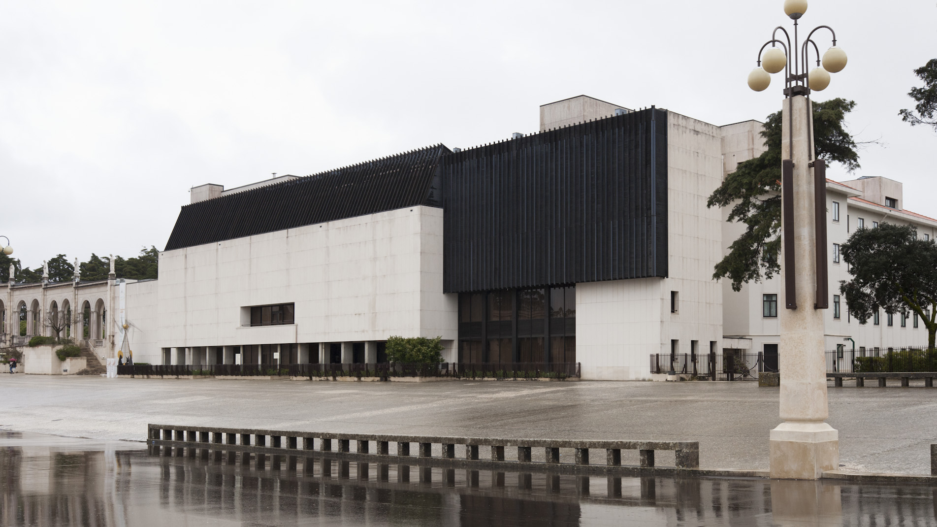 Casa de Retiros de Nossa Senhora do Carmo, Fátima